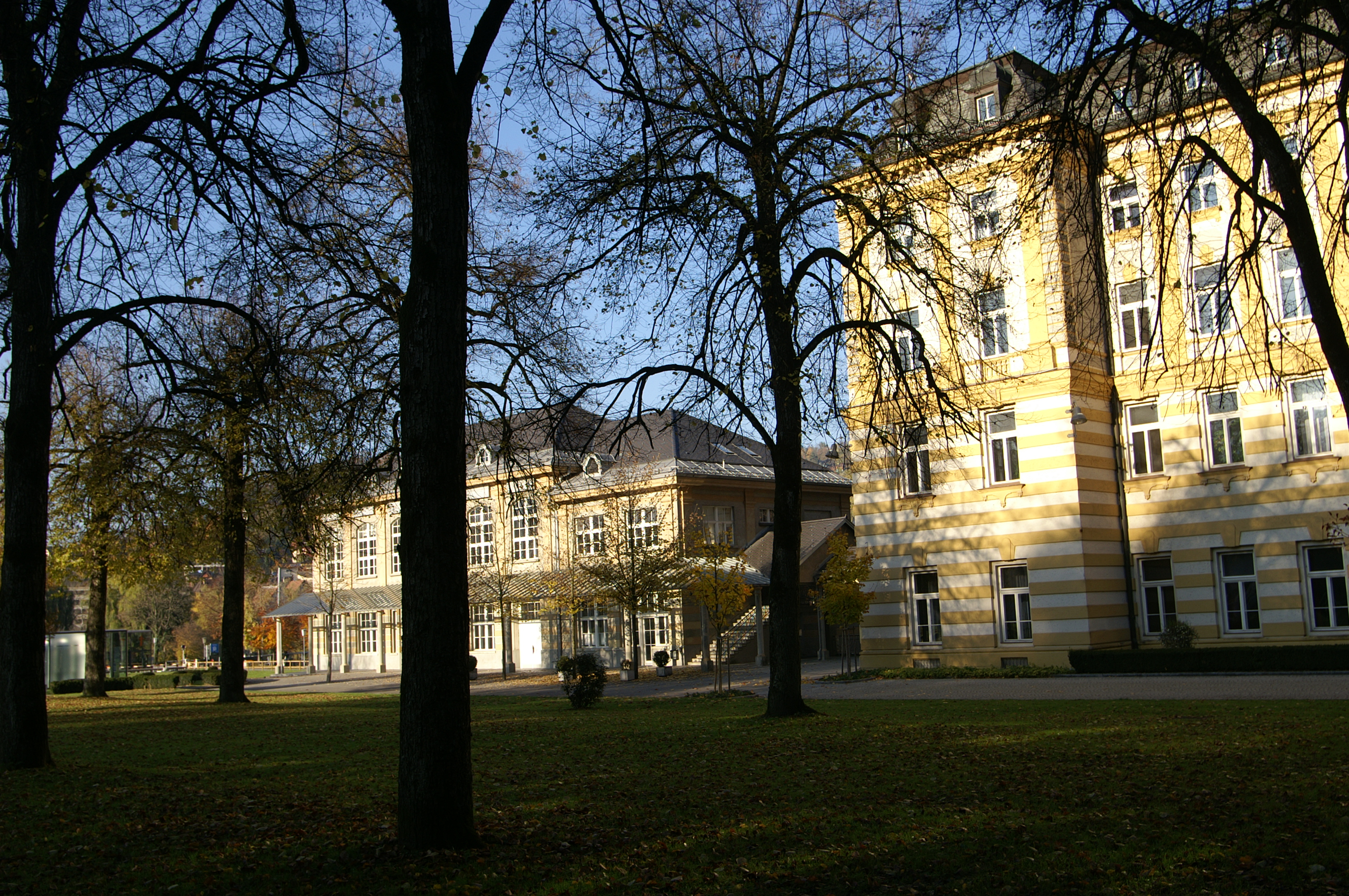 das Stella Matutina, in der Reichenfeldgasse 7-9; heute Landeskonservatorium wurde 1899 durch Peter Hutter in Feldkirch, Vorarlberg erbaut.